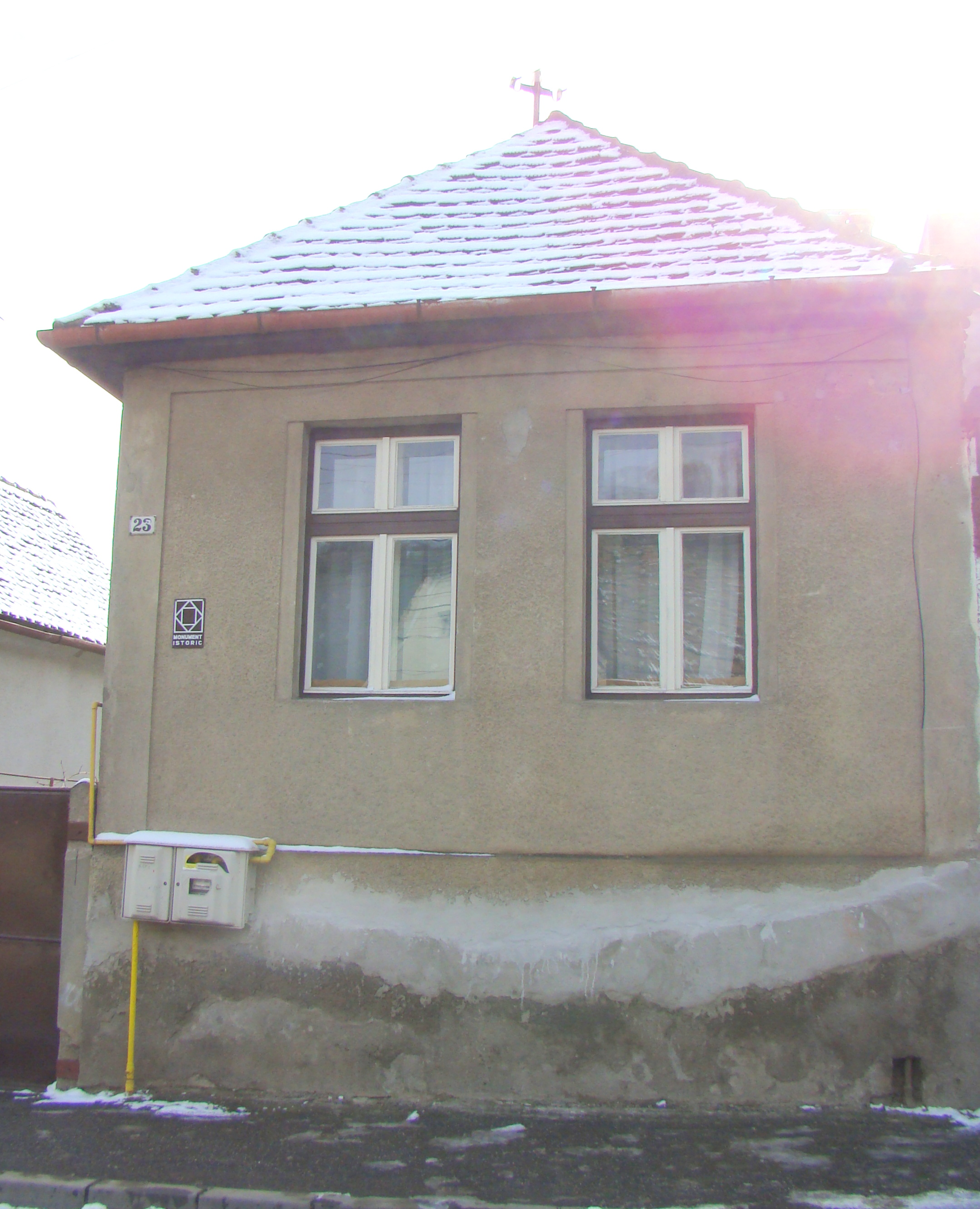 Casă, municipiul Sighișoara, str. Ștefan cel Mare 23 sec. XIX